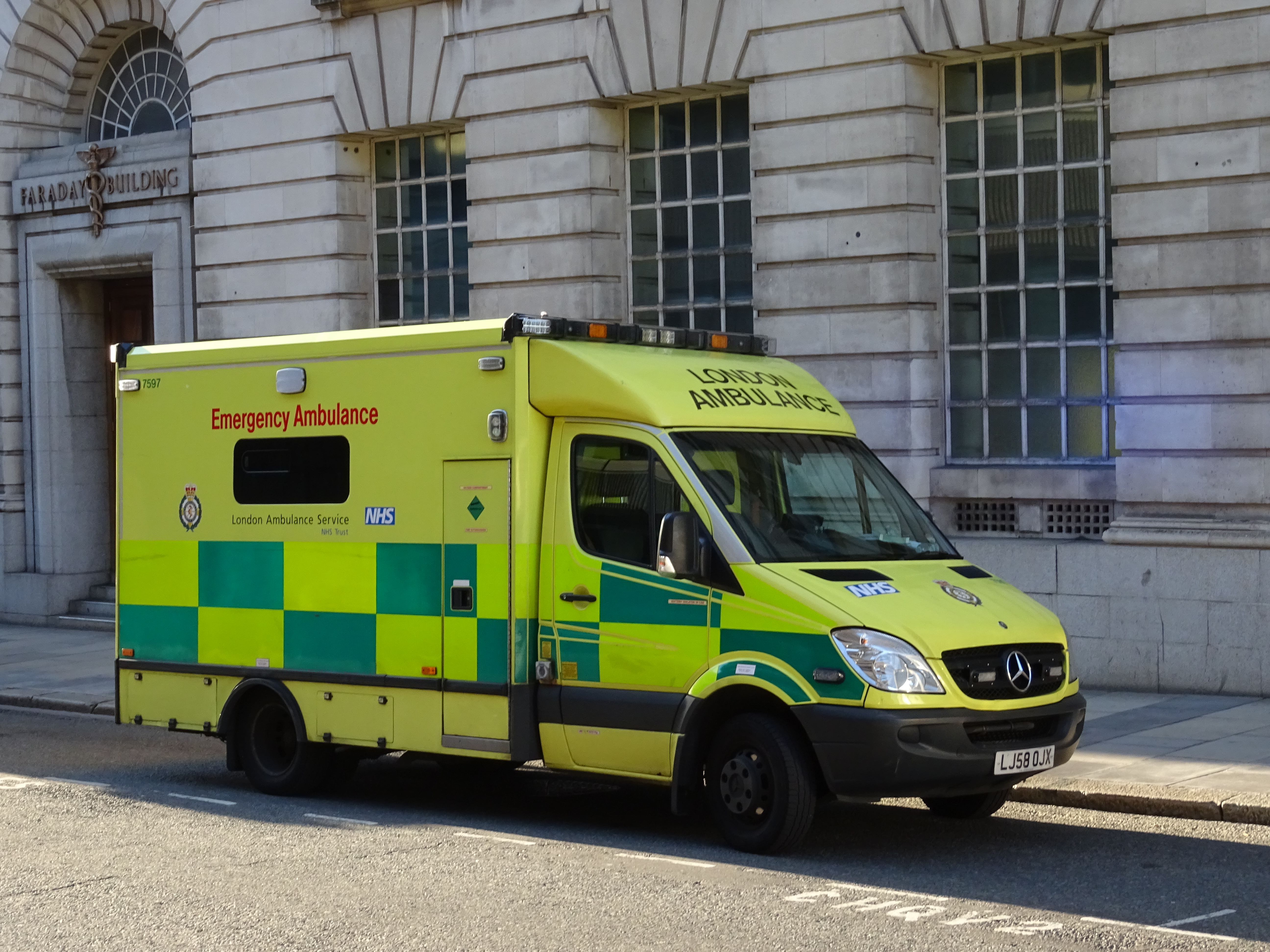 LJ58OJX LONDON AMBULANCE QUEEN VICTORIA STREET CITY OF LONDON